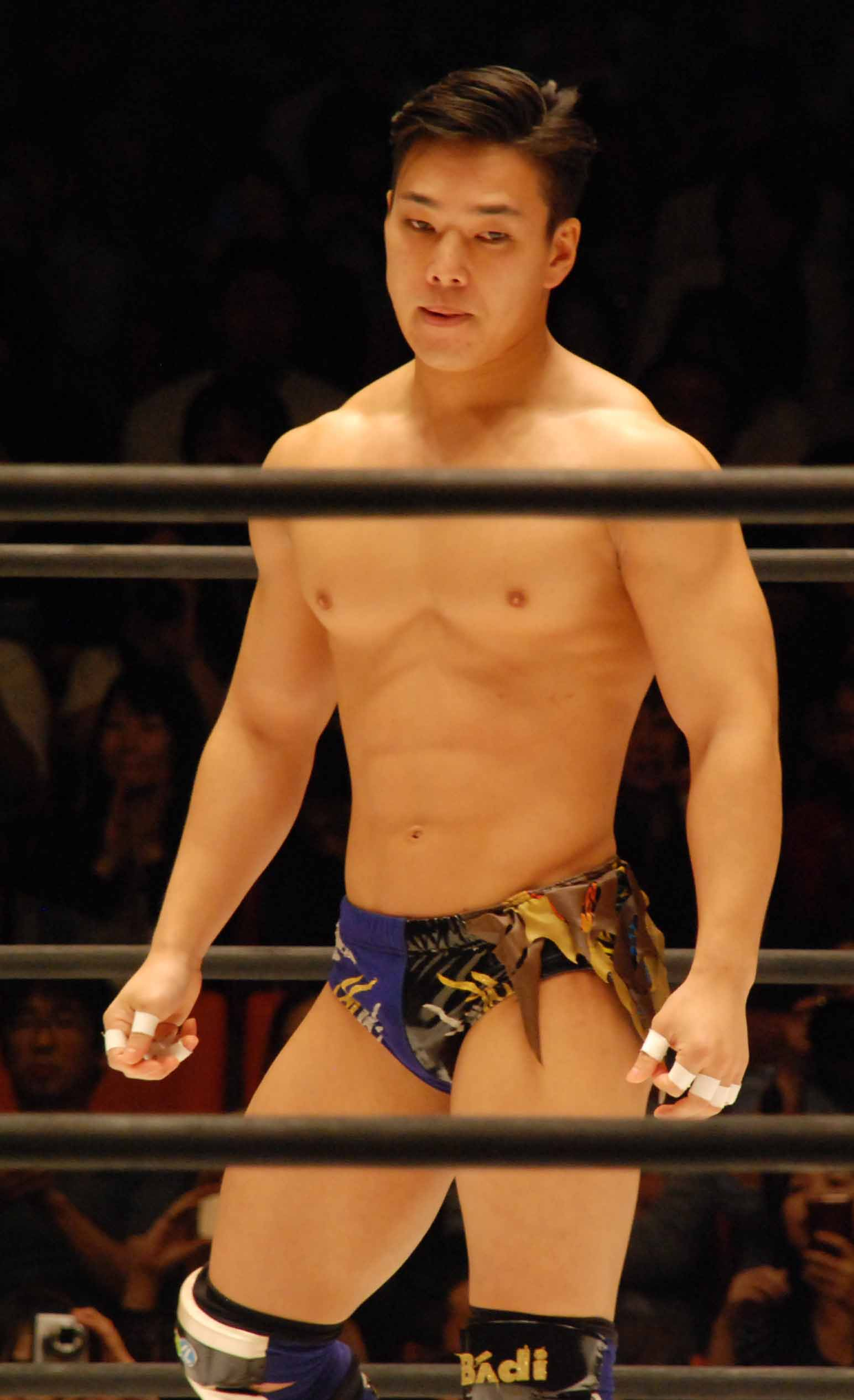 2018年9月12日 J STAGE後楽園大会